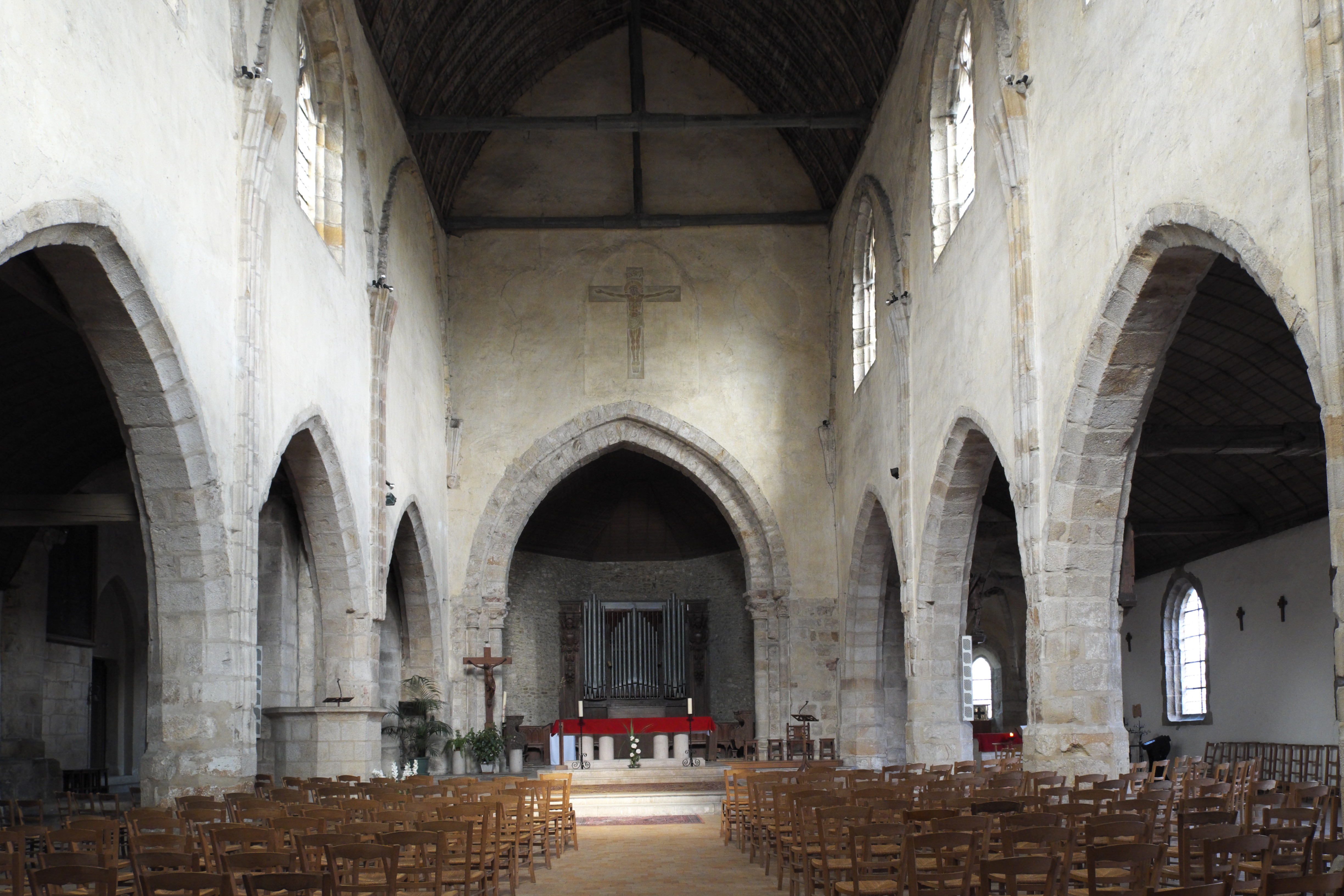 Katholische Kirche Saint-Pierre in Épernon im Département Eure-et-Loir (Centre-Val de Loire/Frankreich), Innenraum .